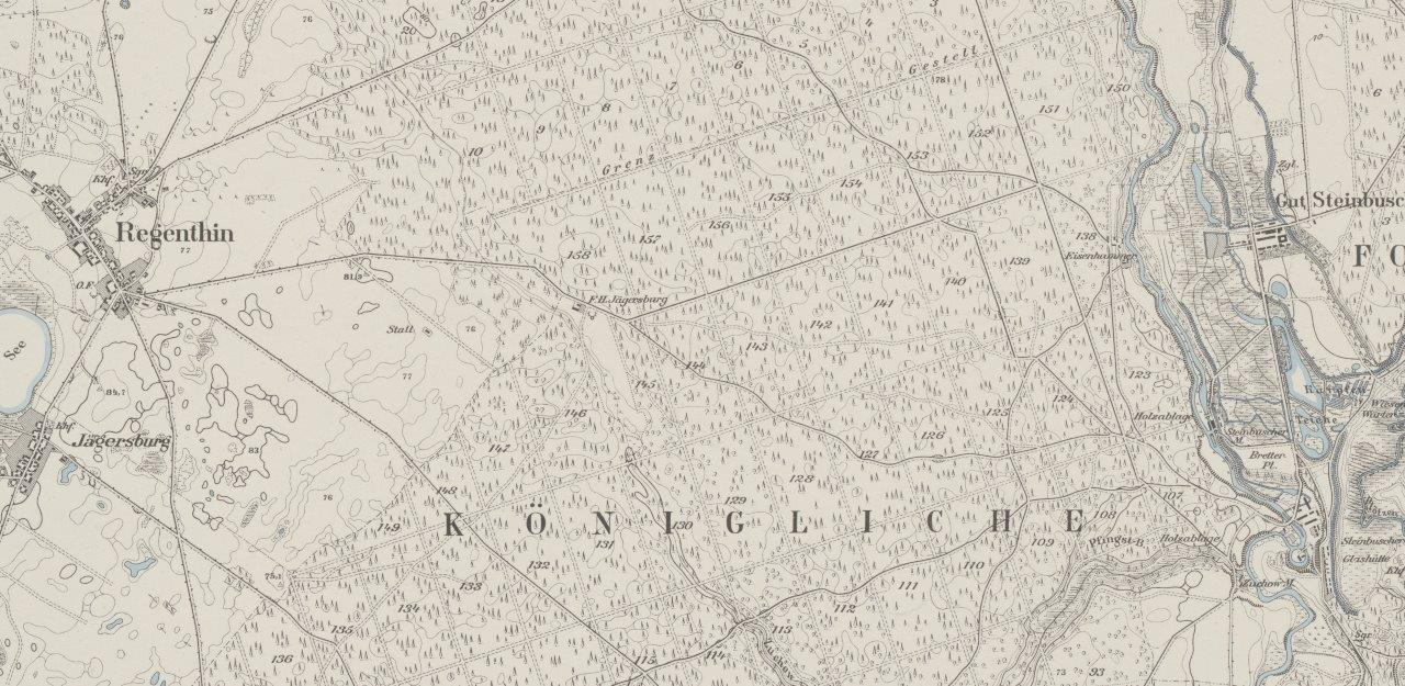 Suchów Dittmarswalde Radęcin Regenthin F.H. Jagersburg